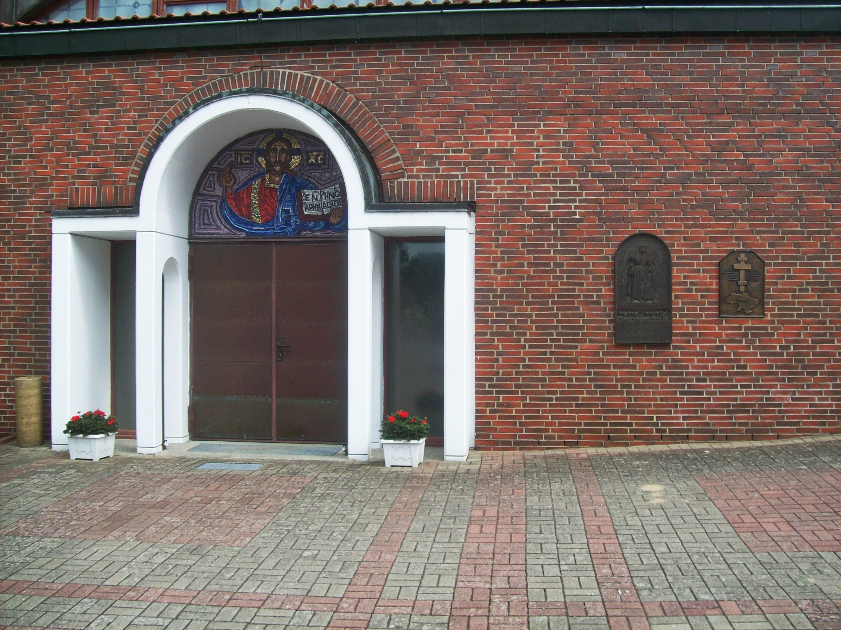 Eingang der Allerheiligenkirche, Hamburg-Hausbruch